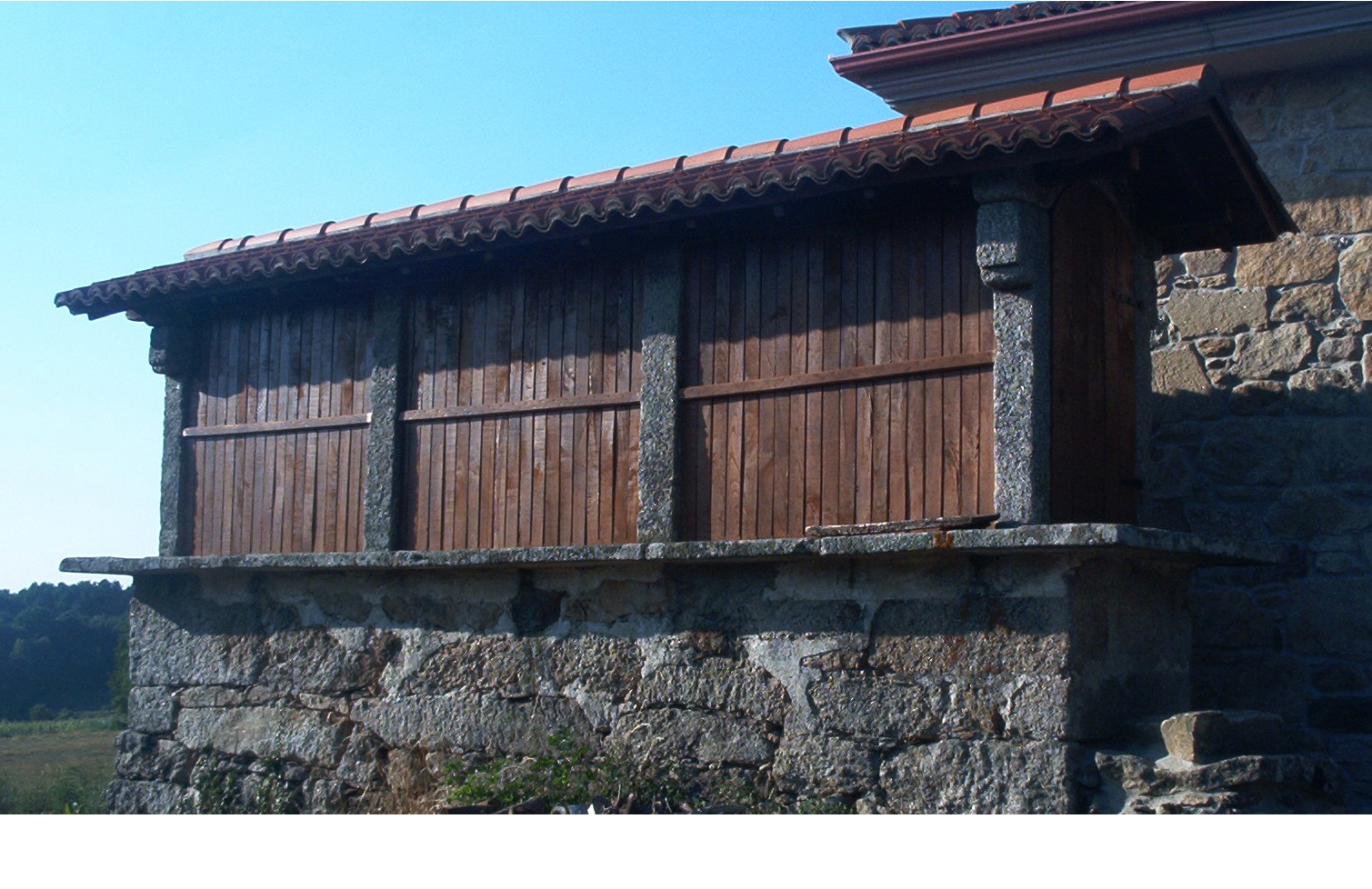 Hórreo en Feás (Alvidrón) Antas de Ulla